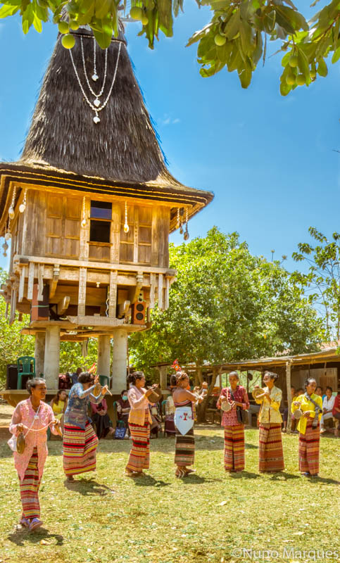 Uma Lulik